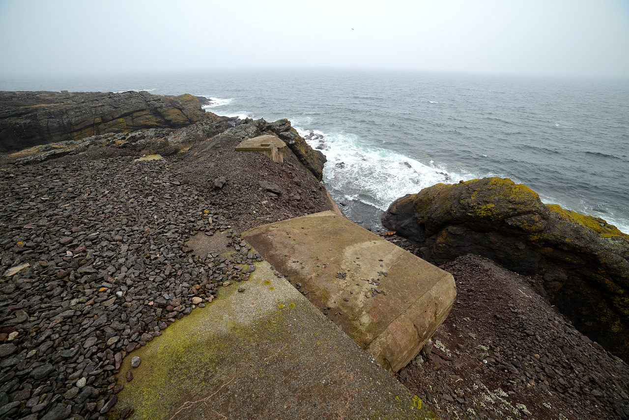 Rauøy fort i Oslofjorden